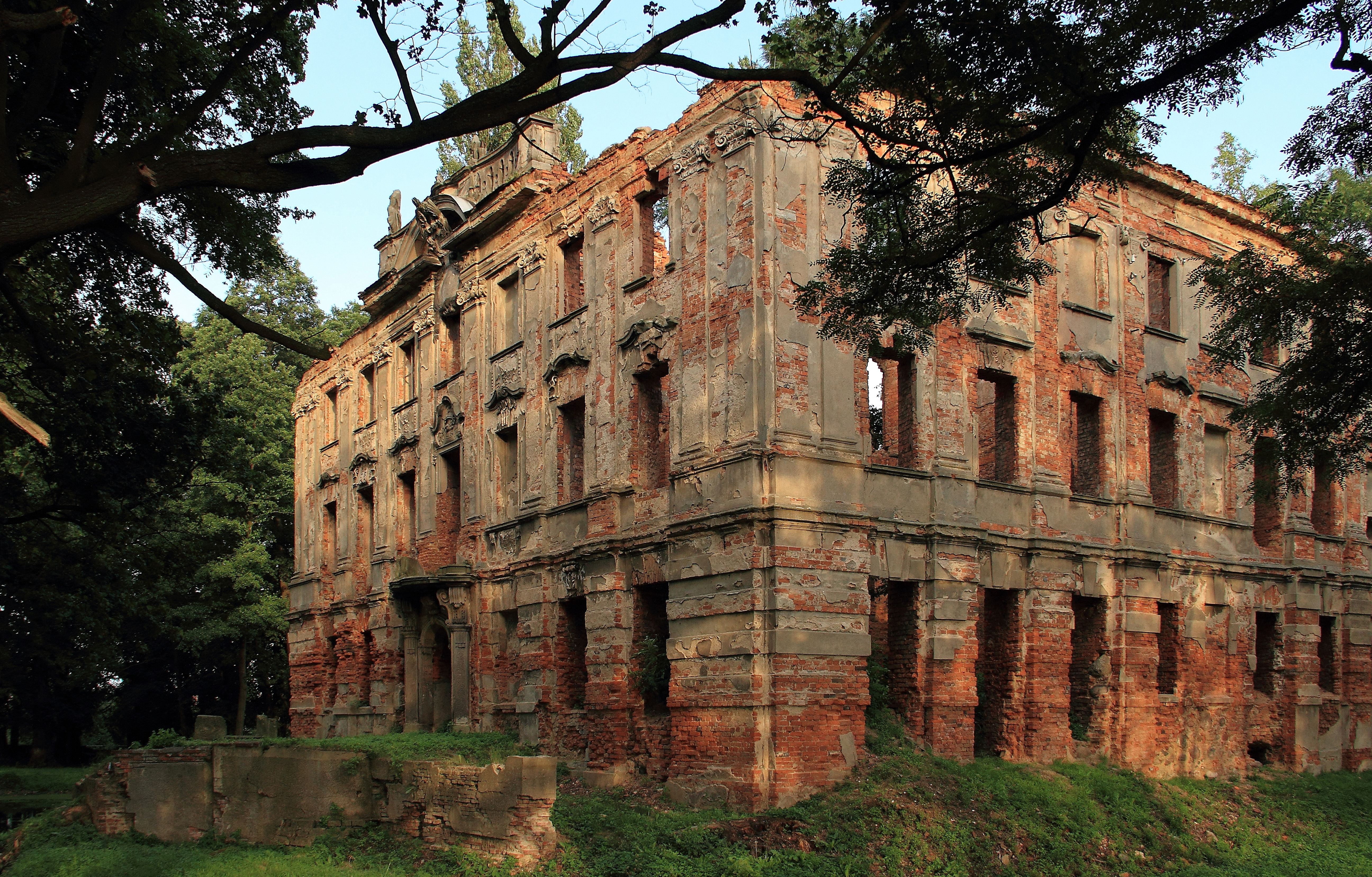 Krzydłowice - pałac (ruina) z parkiem (zabytek nr rejestr. A/2967/173/323/L z dn. 15.03.61)